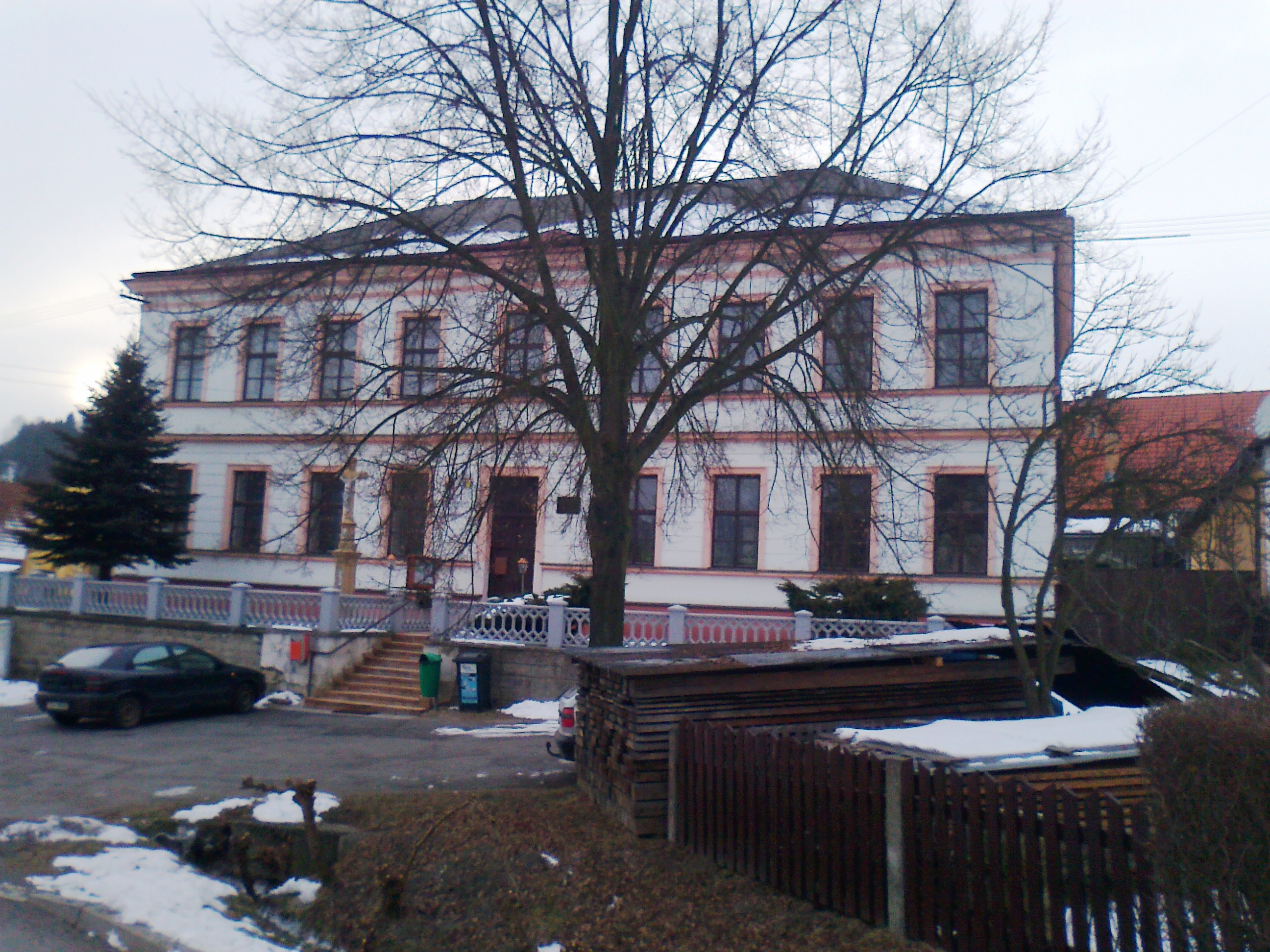 Obecní úřad Bělé u Jevíčka, dříve základní škola